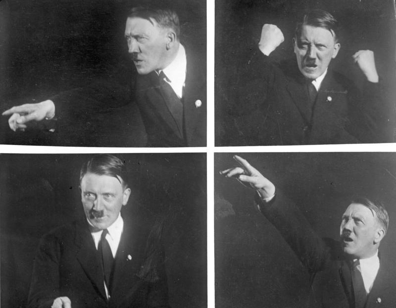 Interessante Rednerposen des Führers der nationalsozialistischen Arbeiterpartei, Adolf Hitler! Adolf Hitler machte durch seine Zeugenaussagen vor dem Reichsgericht in Leipzig viel von sich reden. Hitler testifying before the Supreme Court in Leipzig.